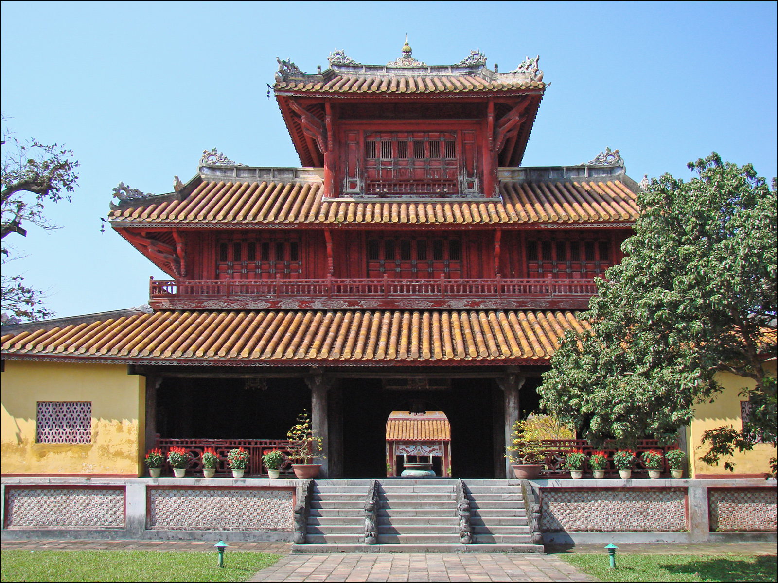 Le pavillon des âmes célèbres (Hiem Lam Coc) était destiné à accueillir les femmes des familles royales, les jours de fête.